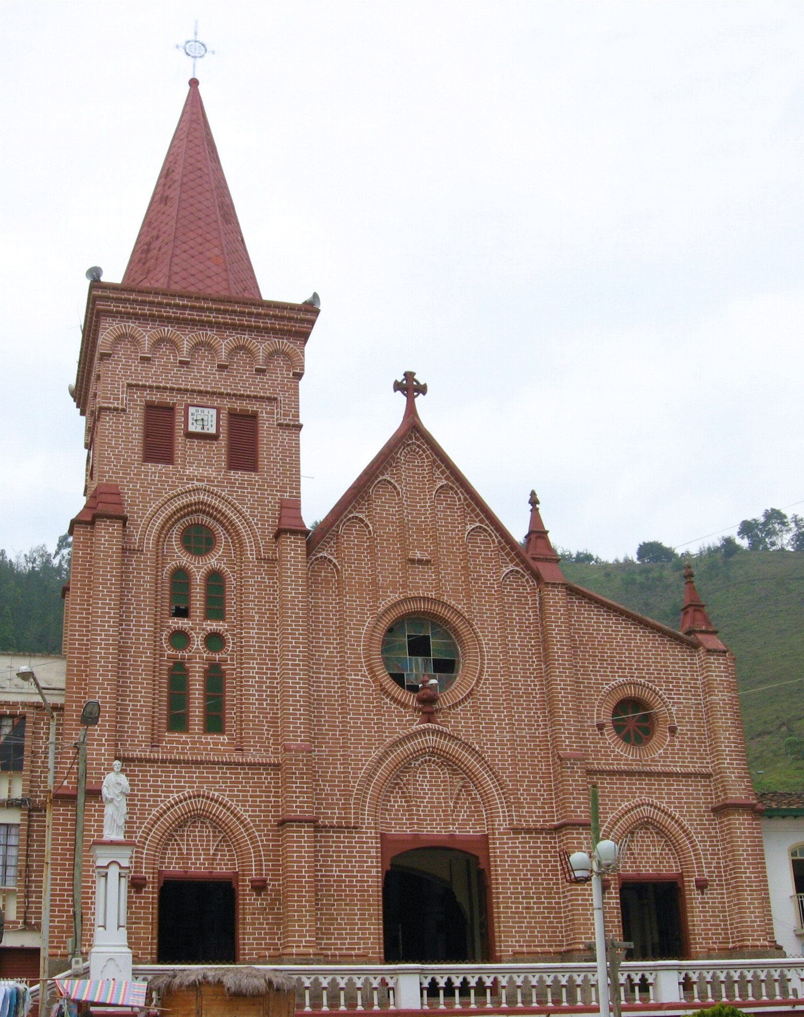 Iglesia de Nuestra Señora de las Mercedes, del Municipio de Montebello, Antioquia, Colombia